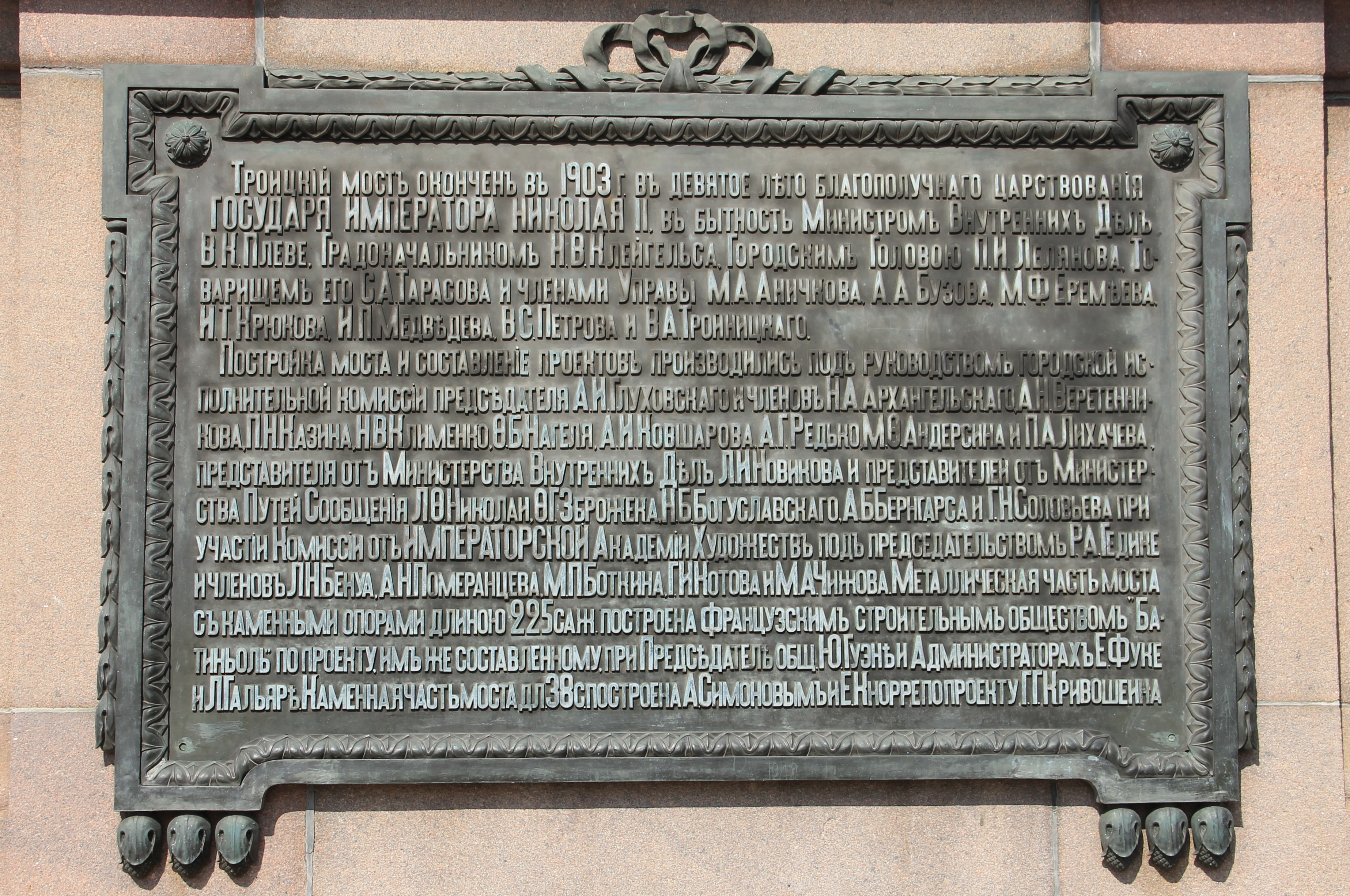 Мемориальная доска на левобережном устое моста с верховой стороны. Троицкий мост через Неву, Санкт-Петербург